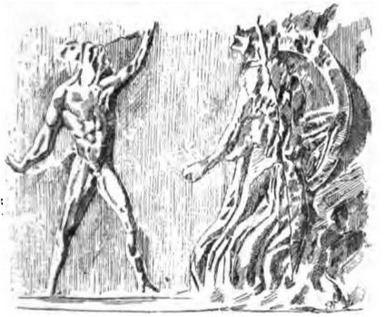 Relief des sog. Finlay-Kraters, Nationalmuseum Athen Inv. 127